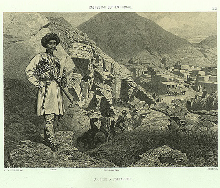 Daghestan septentrional. Arrivee a Tsatanykh